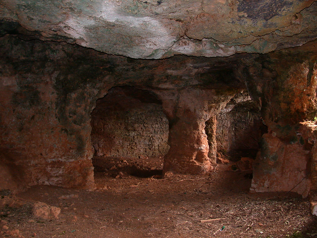 Cueva artificial funeraria (hipogeo) de la Edad del Hierro de Mallorca (Cultura talayótica).